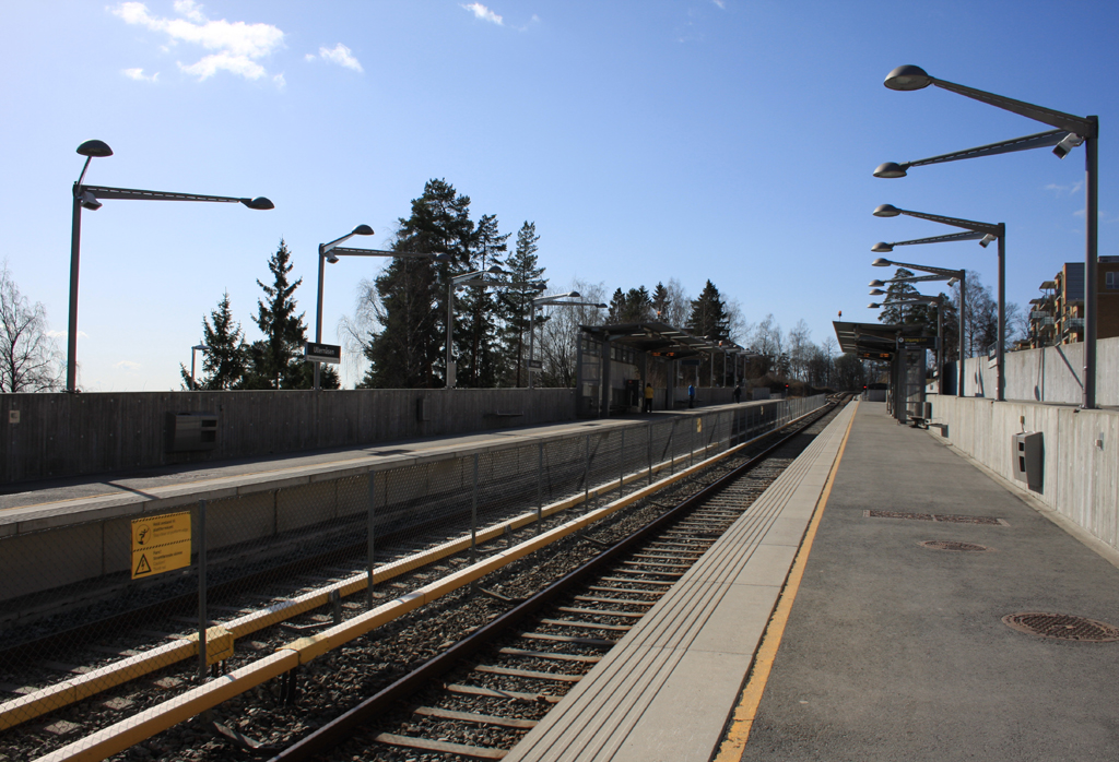 Ullernåsen T-banestasjon sett fra Spor 2 mot Åsjordet.